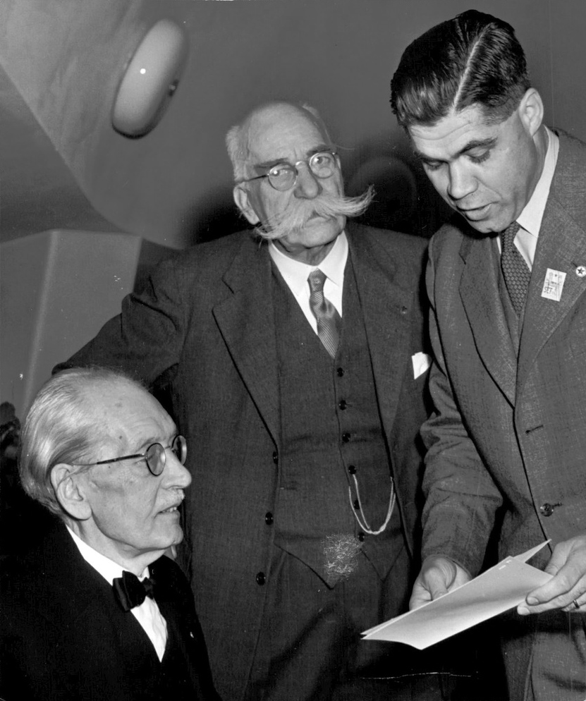 Ordföranden i Esperantoförbundet, Jan Strönne, tillsammans med två veteraner, f. universitetsrektor Waldemar Langlet och redaktör Paul Nylén.På lördagskvällen samlades på Byggnadsföreningen Sveriges esperantister till kongress. Huvudfrågan vid årets möte är esperanto i radio. Ett föredrag i ämnet hålles på söndagen av rektor Karl Söderberg, som tidigare skött de svenska sändningarna på esperanto.